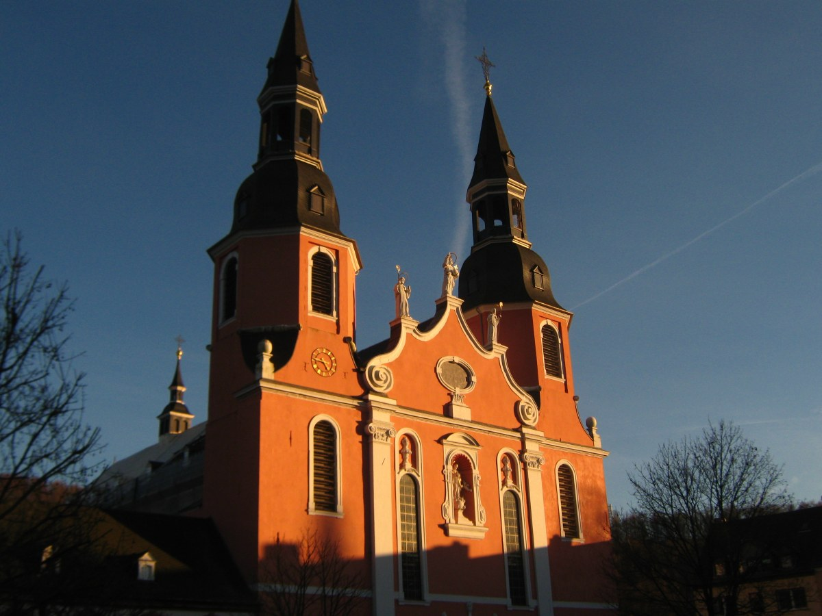 54595 Prüm, Germany